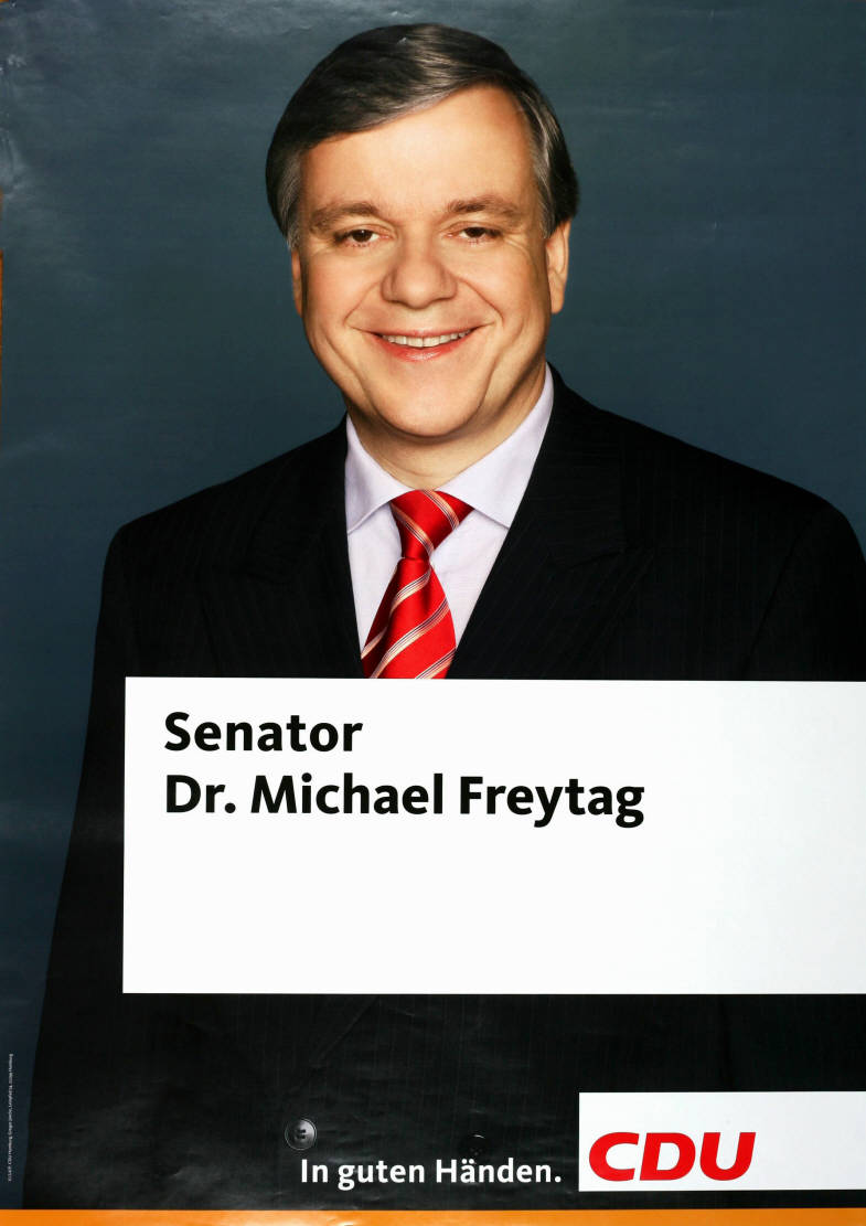 Senator Dr. Michael Freytag In guten Händen. CDUAbbildung:FotoPlakatart:Kandidaten-/Personenplakat mit PorträtAuftraggeber:V.i.S.d.P.: CDU Hamburg, Gregor Jaecke, HamburgObjekt-Signatur:10-006 : 1829Bestand:Plakate zu Bürgerschaftswahlen Hamburg ( 10-006)GliederungBestand10-18:Plakate zu Bürgerschaftswahlen Hamburg (10-006) » CDULizenz:KAS/ACDP 10-006 : 1829 CC-BY-SA 3.0 DE